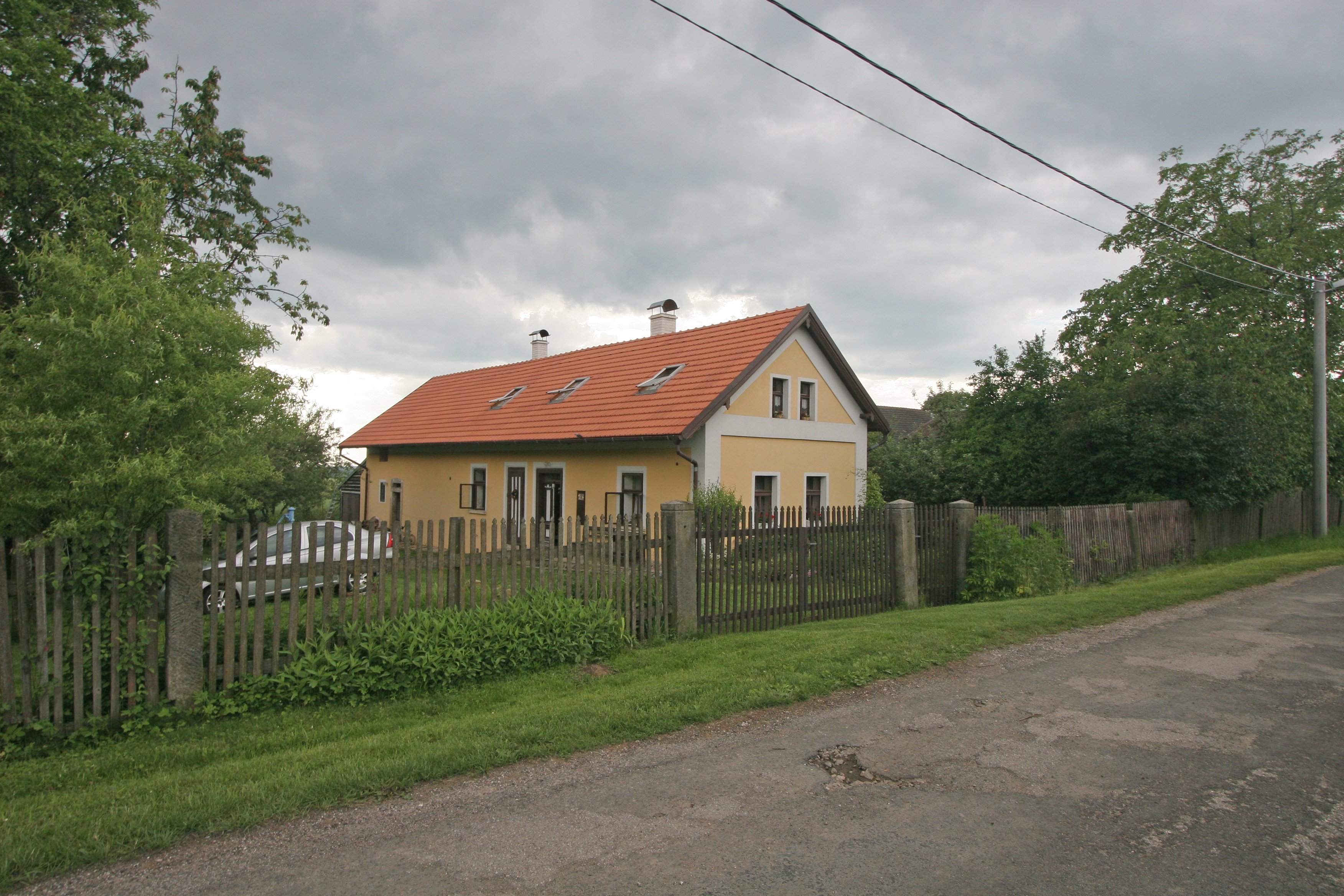 Čenice čp. 2